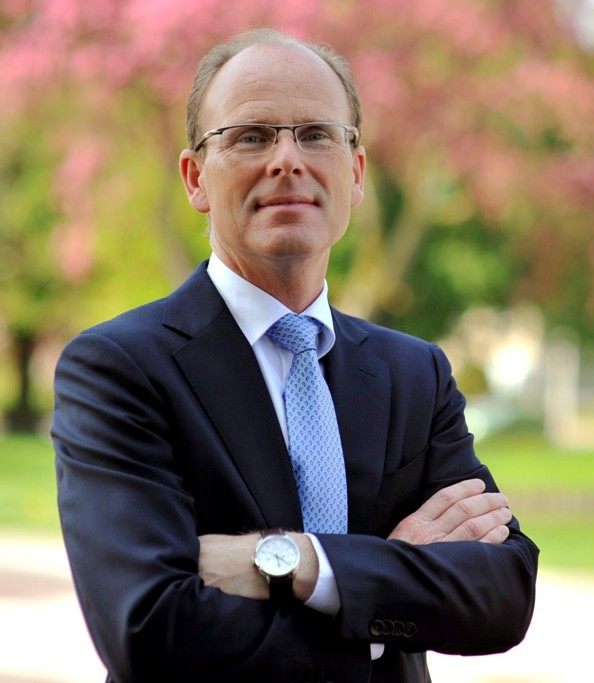 Dominic Schrijer, burgemeester van Zwijndrecht